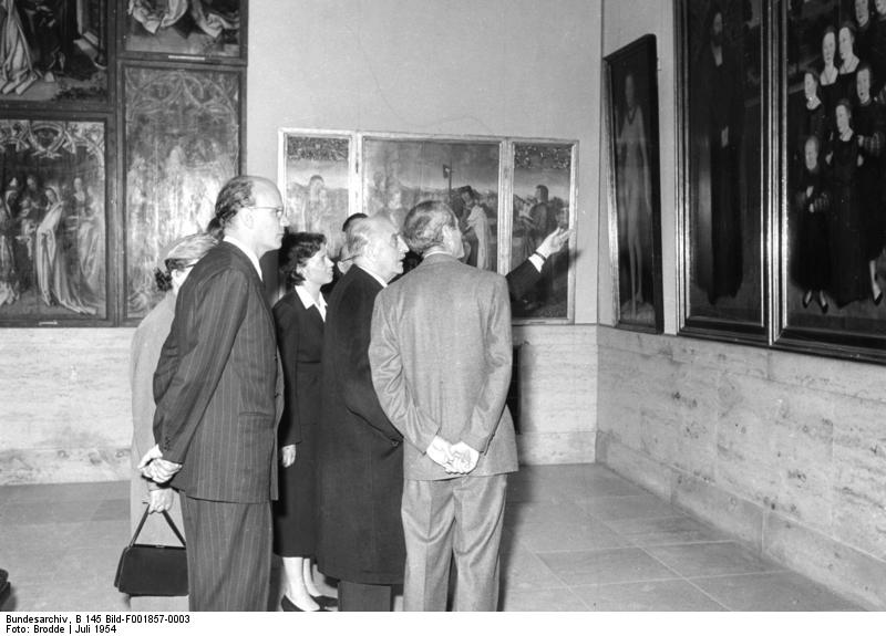 München, Haus der Kunst anlassl. des Besuches des griechischen Ministerpräsidenten Papagos von 30.6-6.7.1954